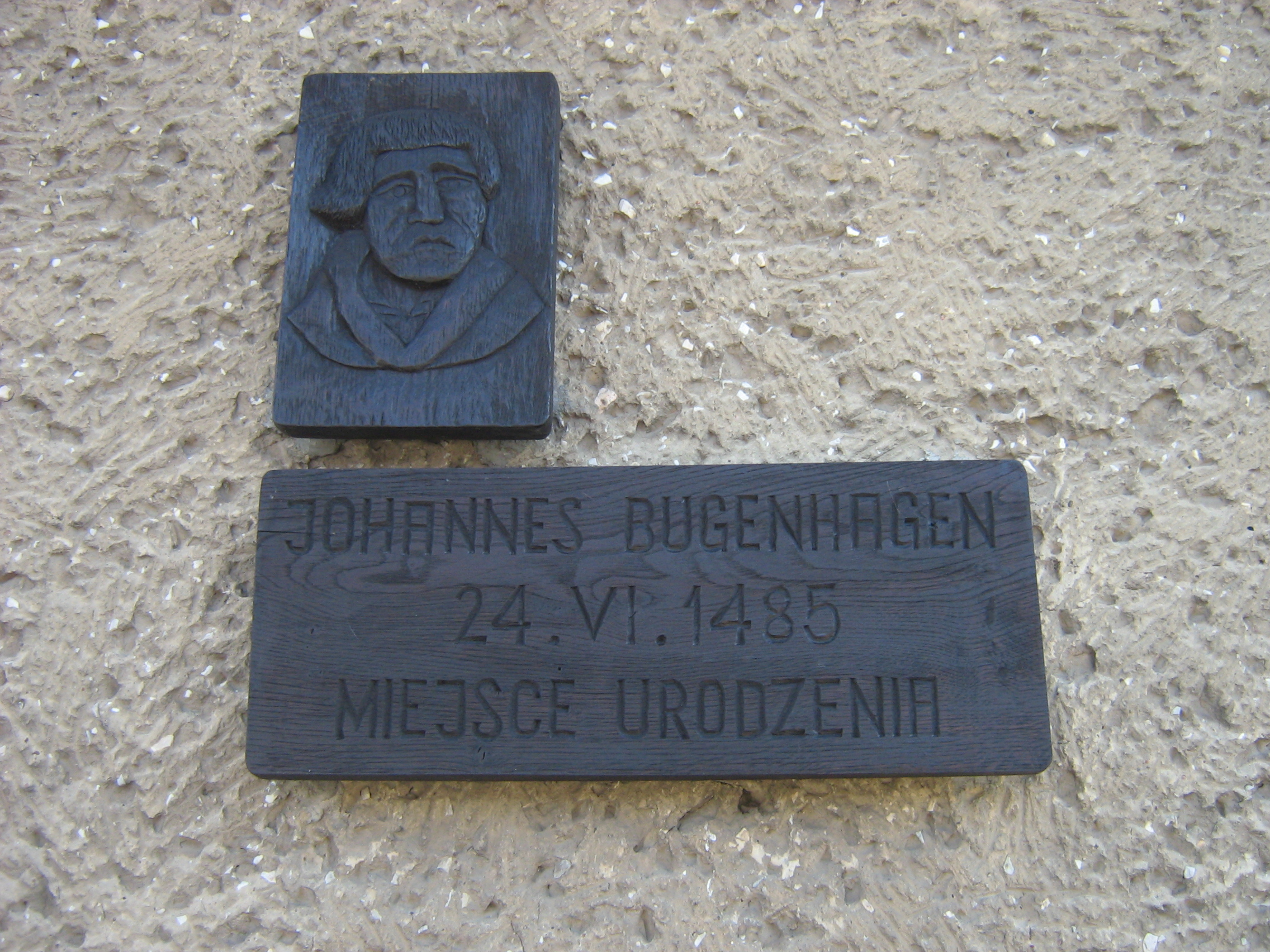 Miejsce urodzenia Jana Bugenhagena w w Wolinie.